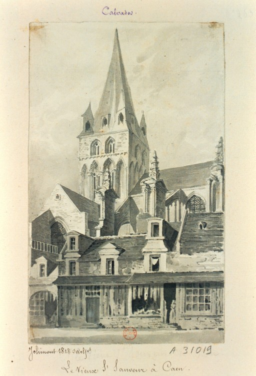 Clocher de l'ancienne église, aujourd'hui appelée Vieux Saint-Sauveur, au début du XIXe siècle.